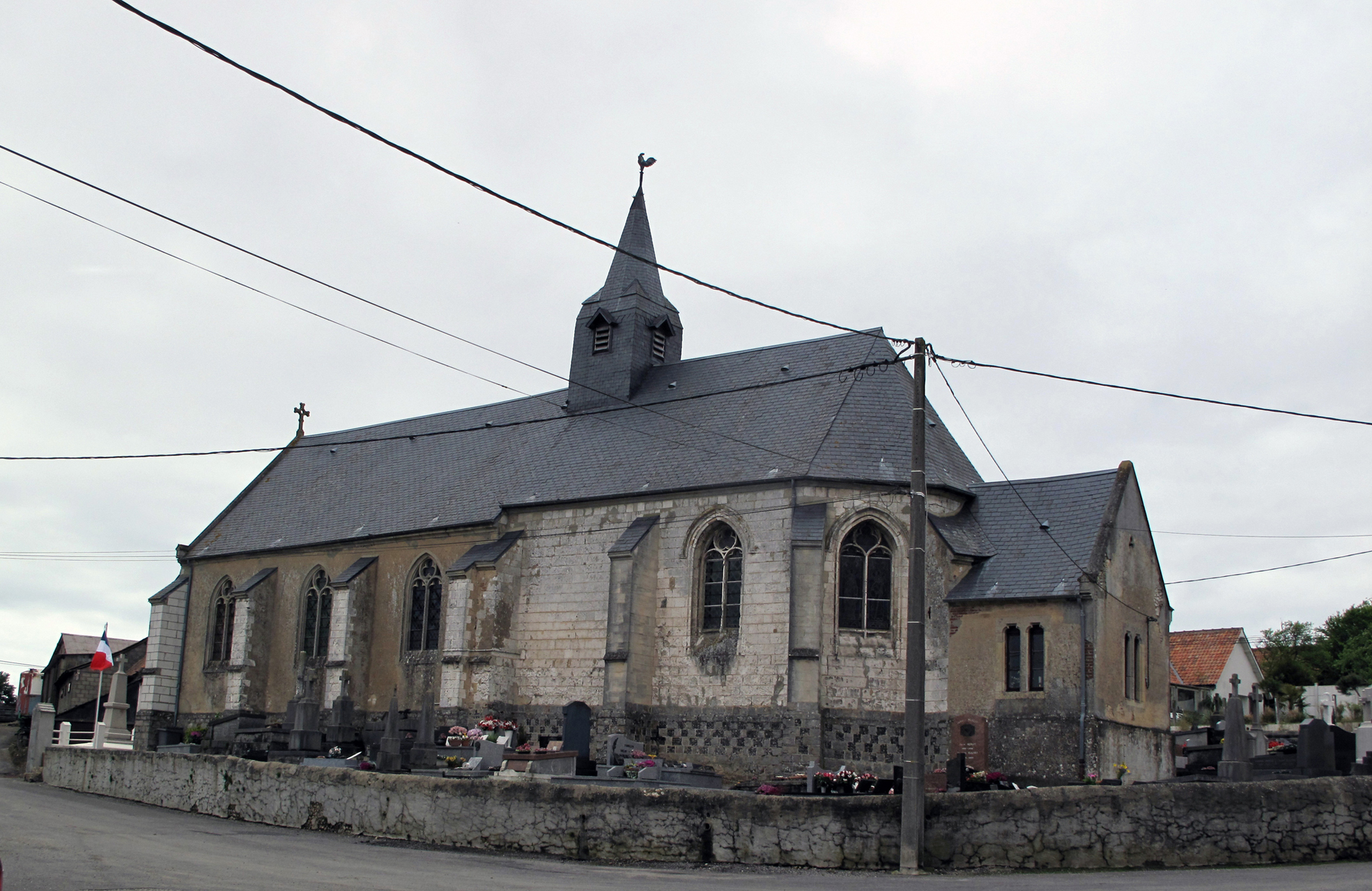 Widehem église